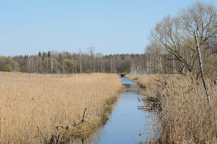 Река Осочанка